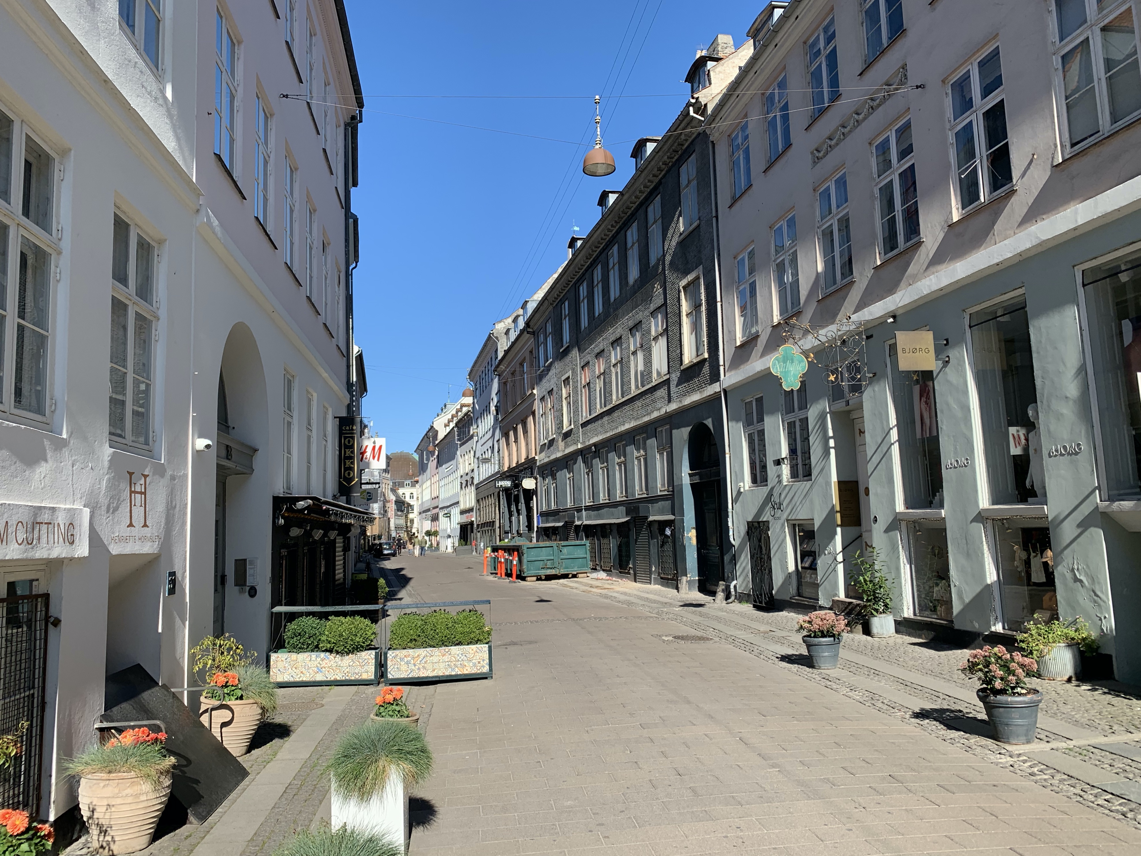 Læderstræde, København